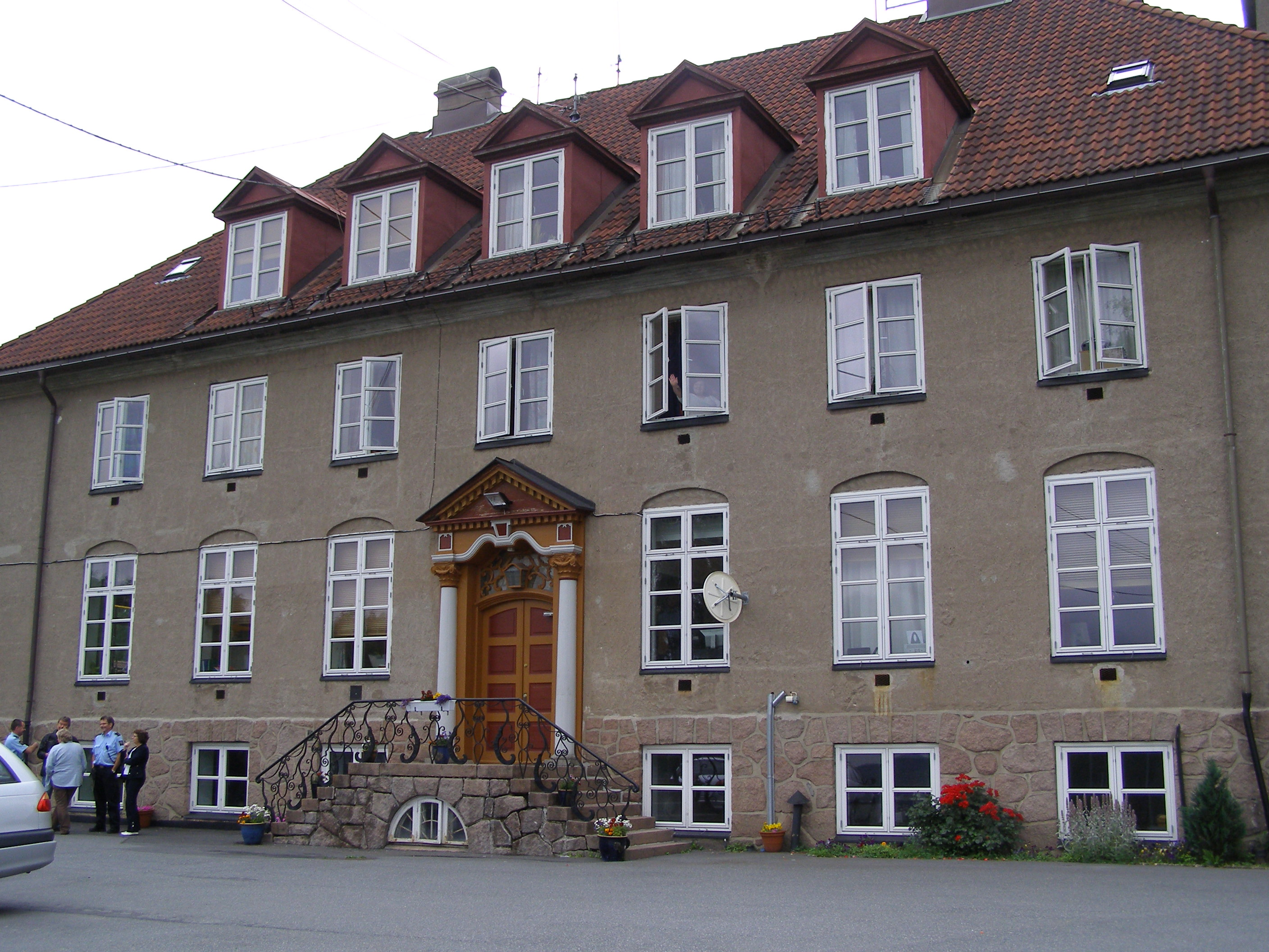 Bredtvedt Prison